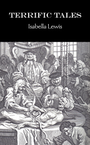 Terrific Tales cover